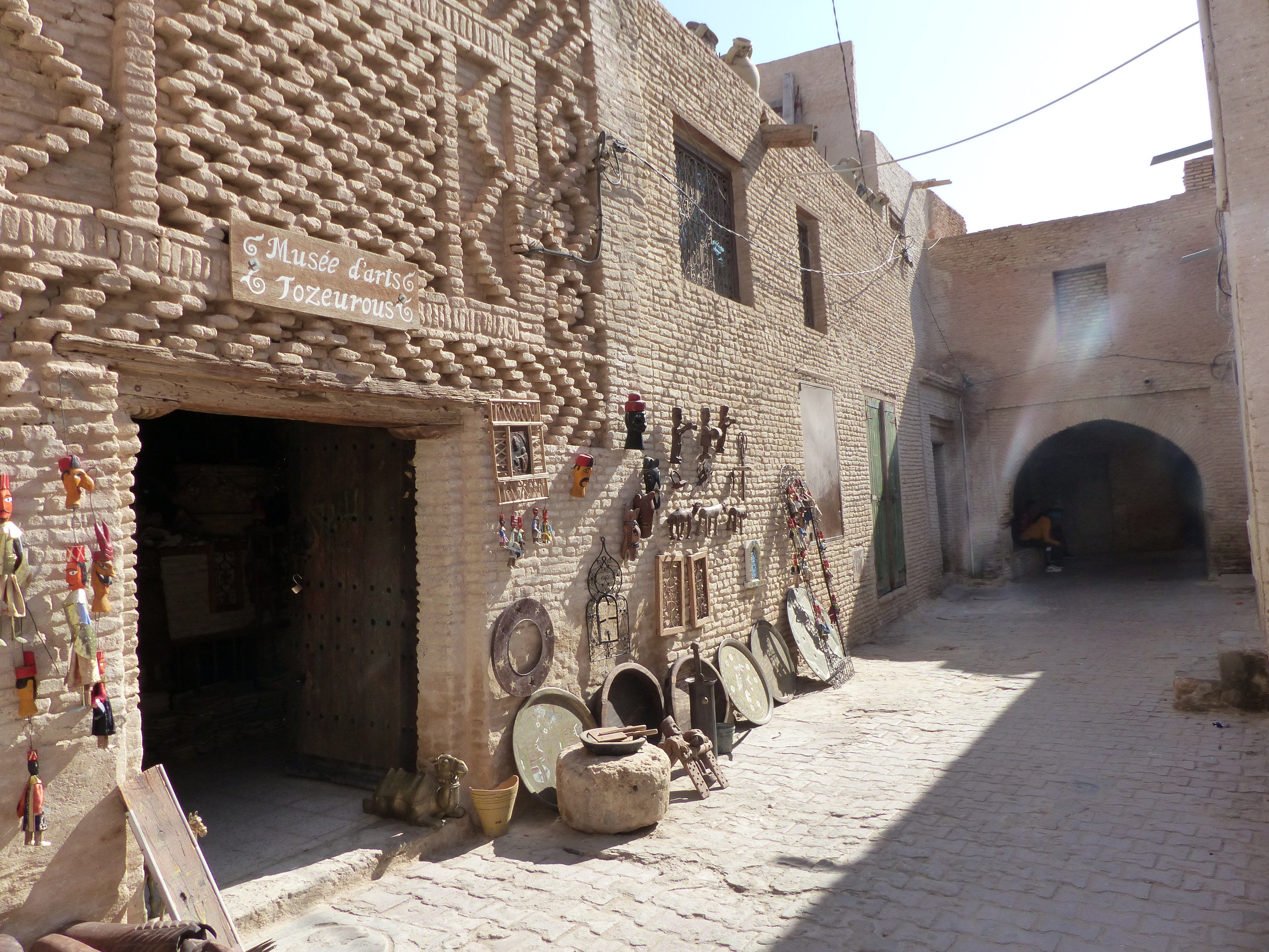 Médina de Tozeur